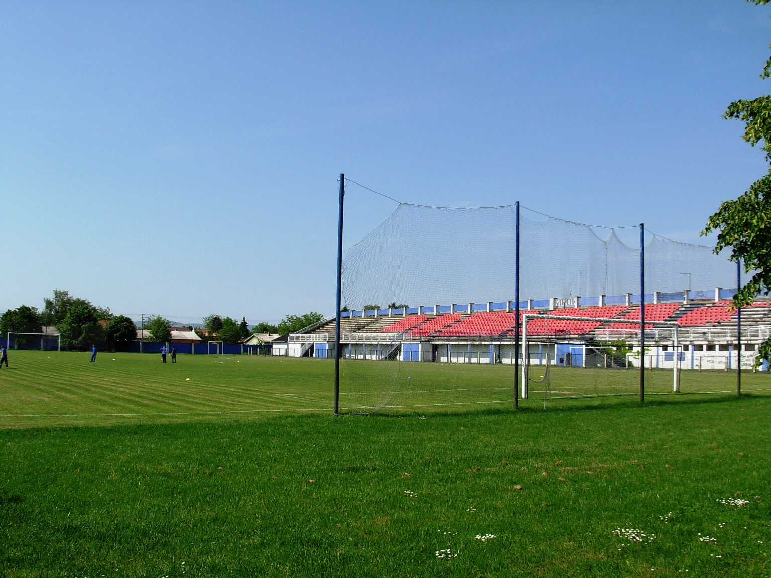 Stadion FK Veternik.